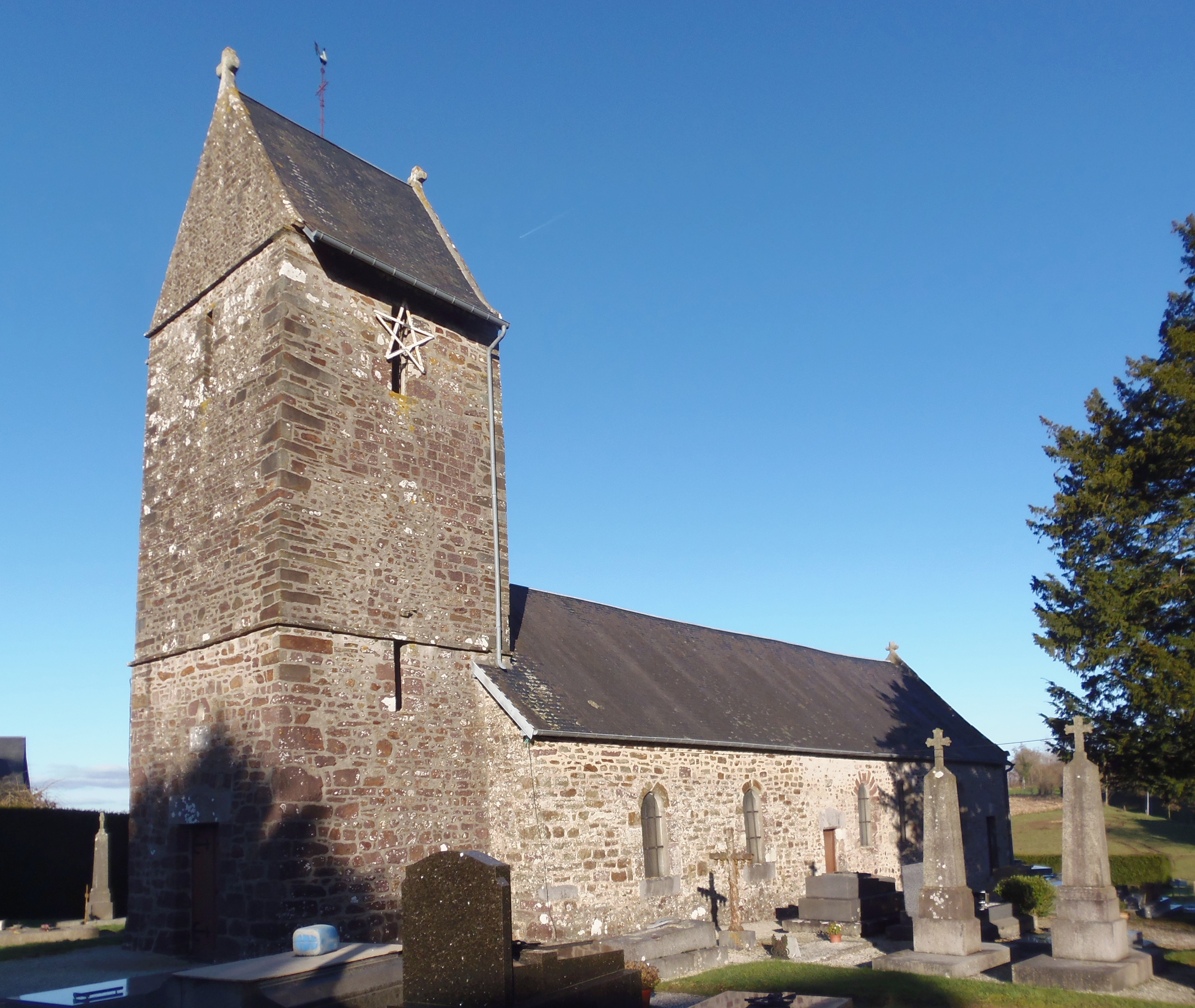 Grimesnil (Normandie, France). L'église Saint-Pierre.